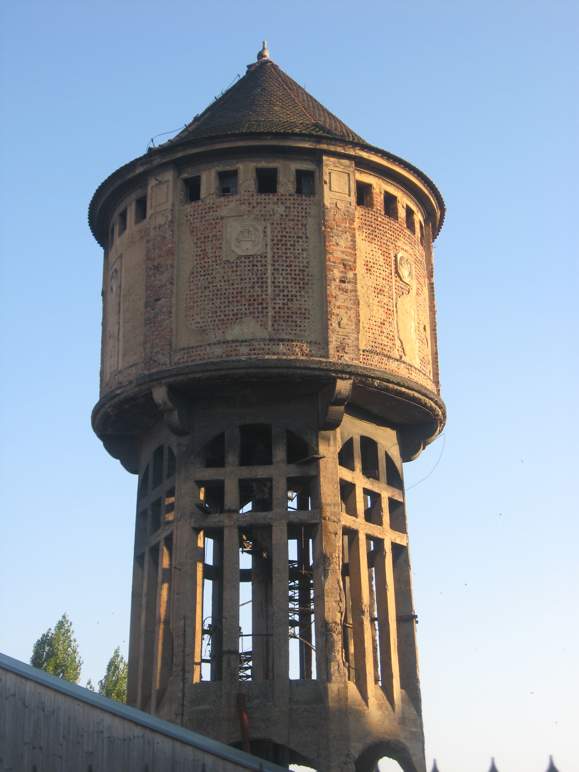 Vodárenská věž v Duchcově